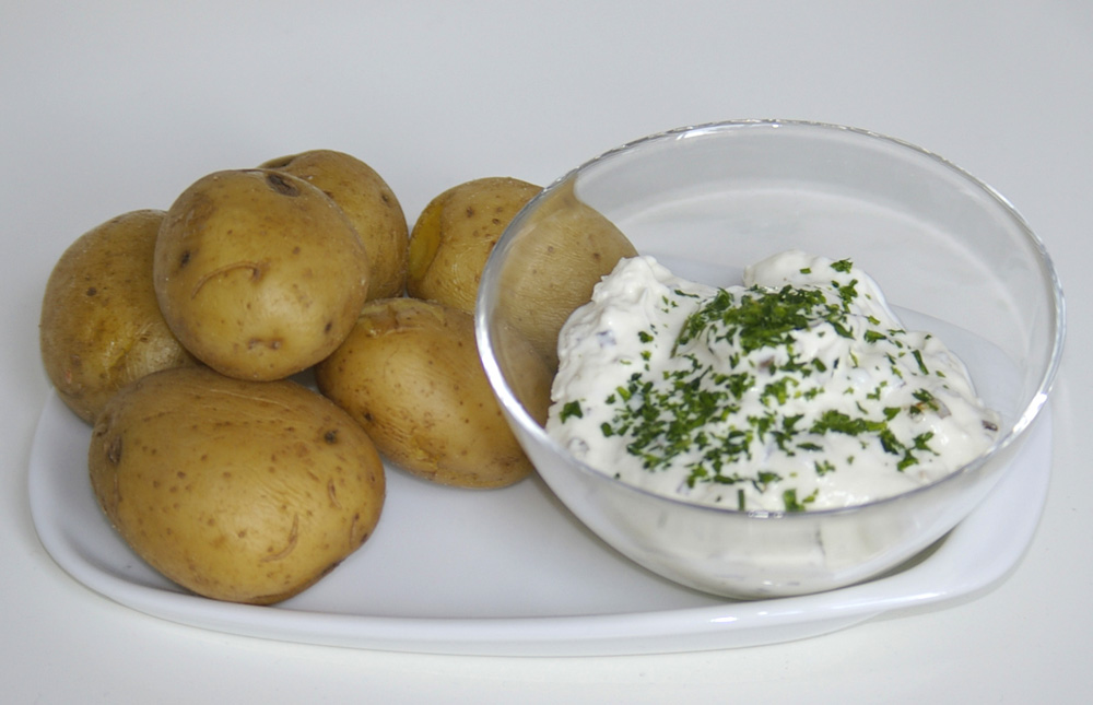 Kartoffeln mit Quarkschälchen